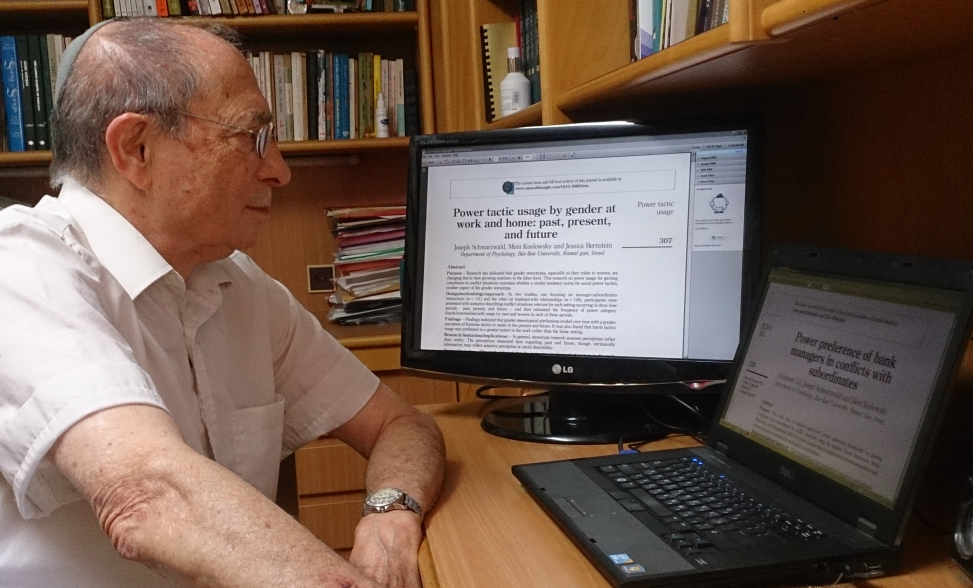 פרופסור יוסף שורצולד